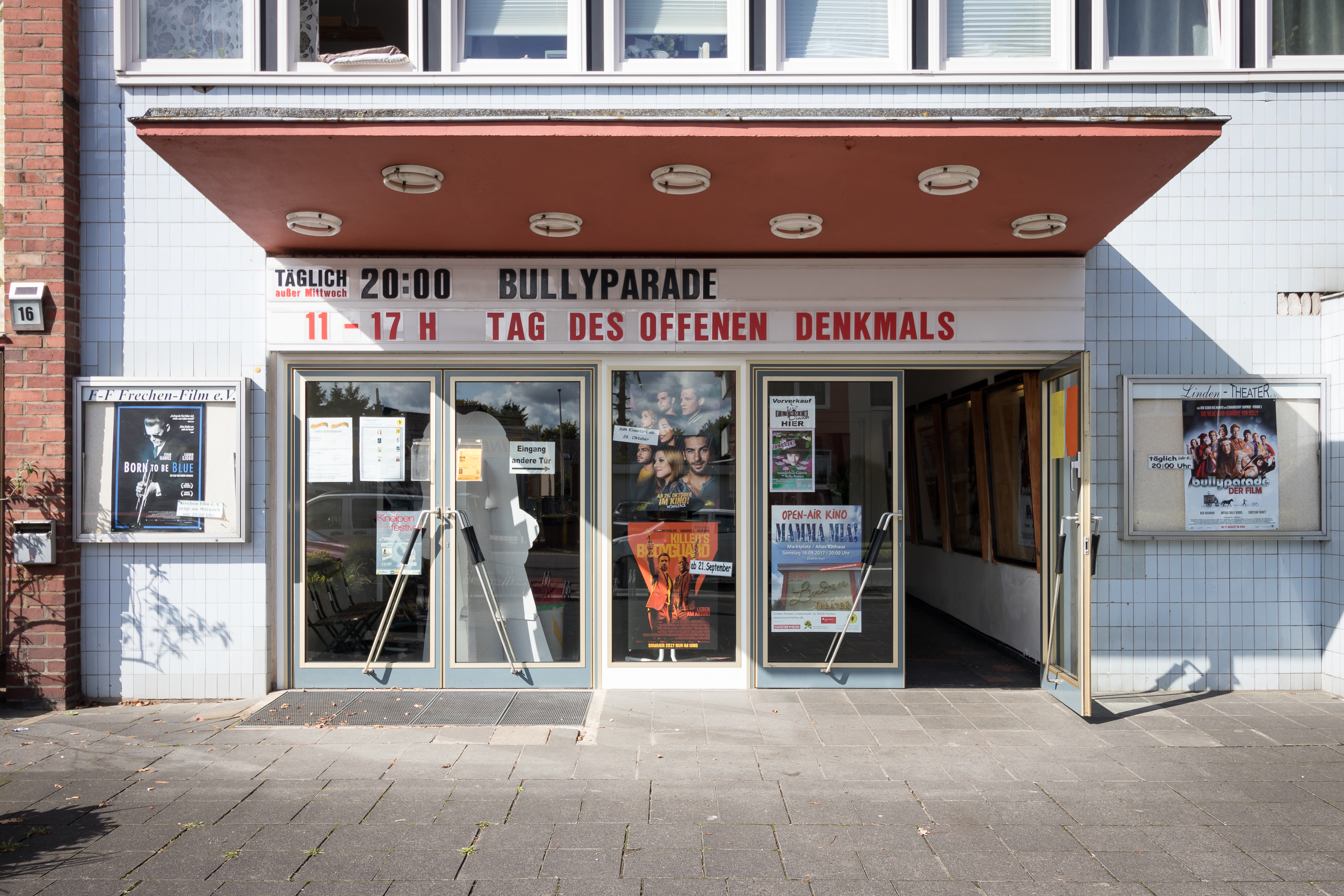 Kino Linden-Theater, Frechen This is a photograph of an architectural monument. 129